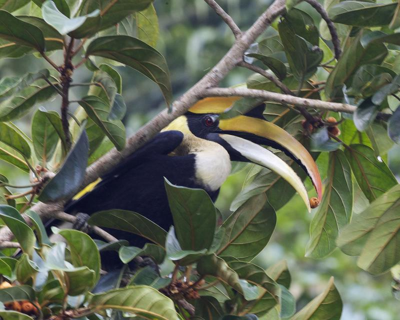 קלאו בכיר אוכל פיקוס